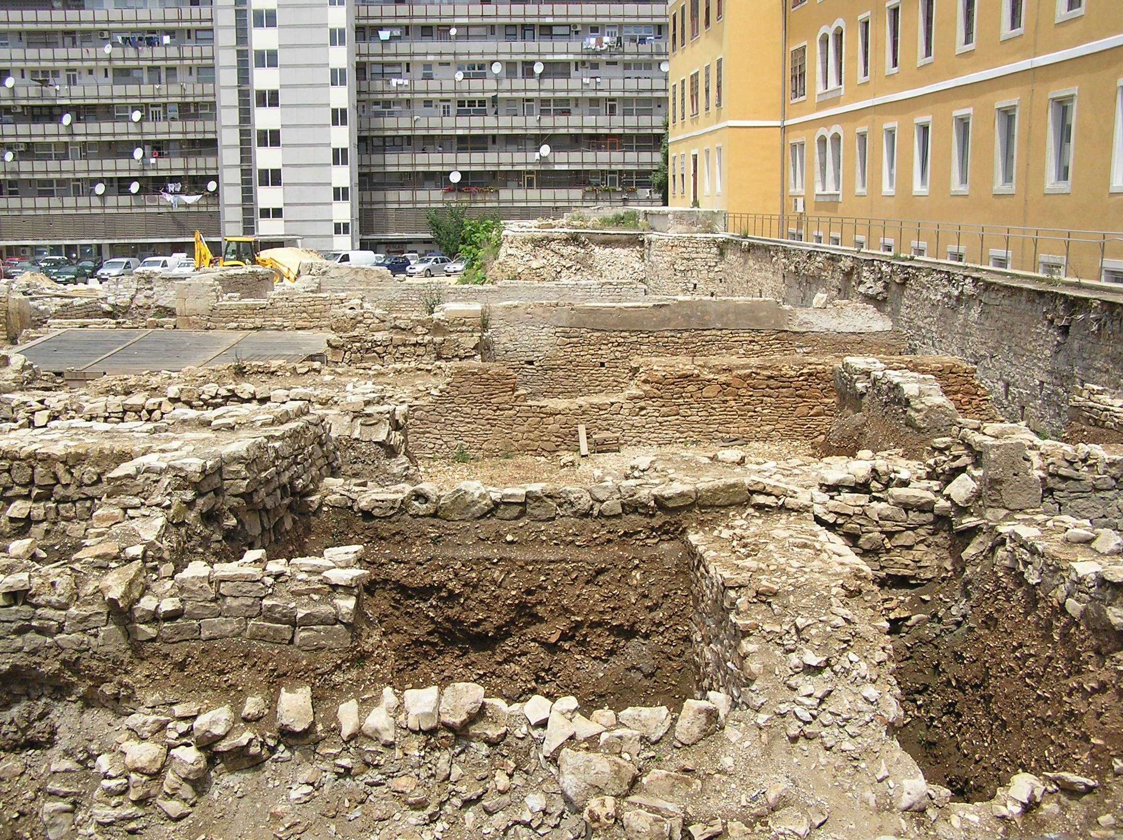 Arheološko nalazište kraj gradske knjižnice - Pula